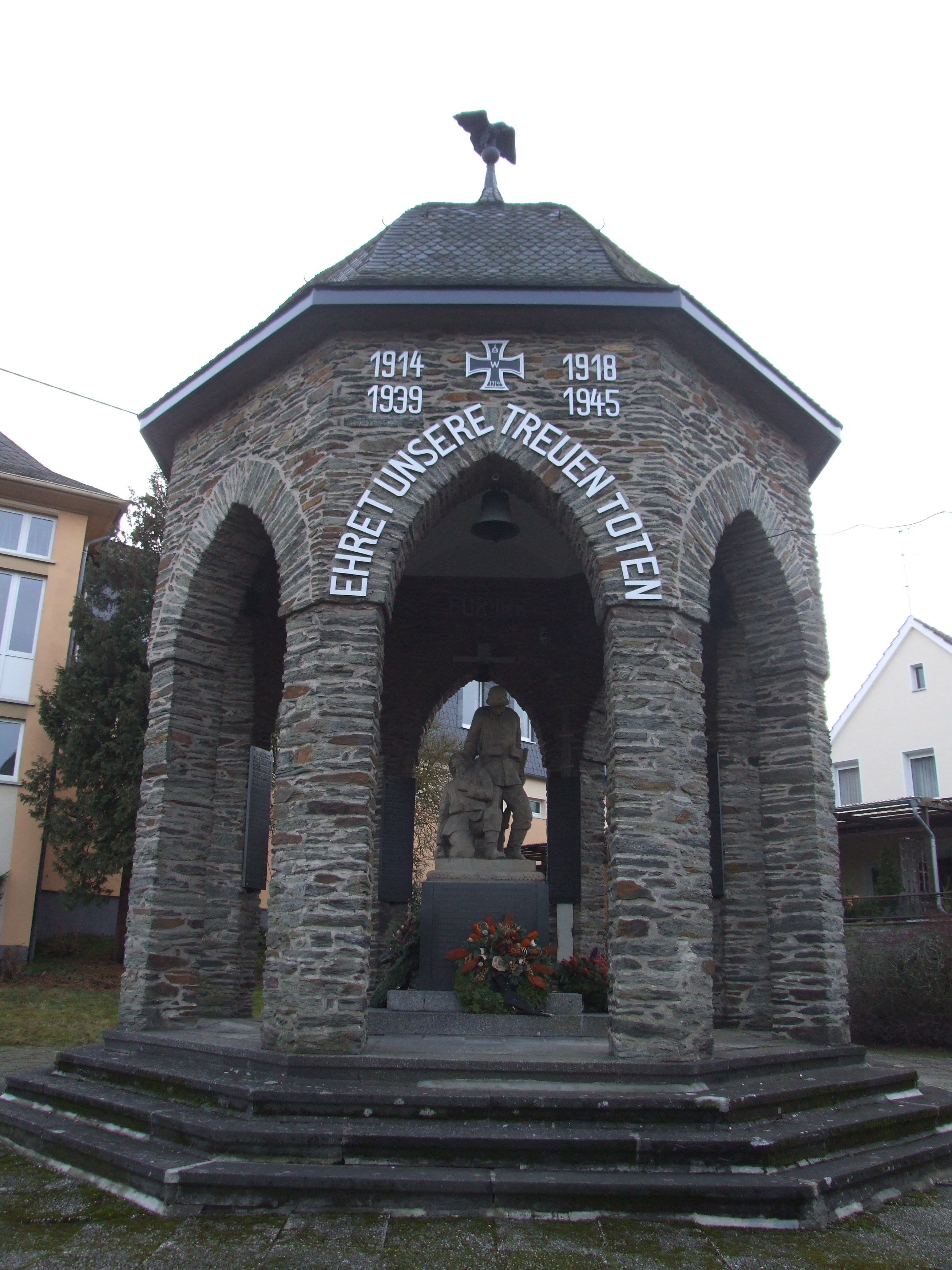 Sohren, Hauptstraße, Ecke Denkmalstraße: Kriegerdenkmal; Sandsteinskulptur unter Oktogon; bauliche Gesamtanlage